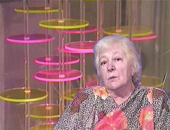 Portrait de Martha Boto